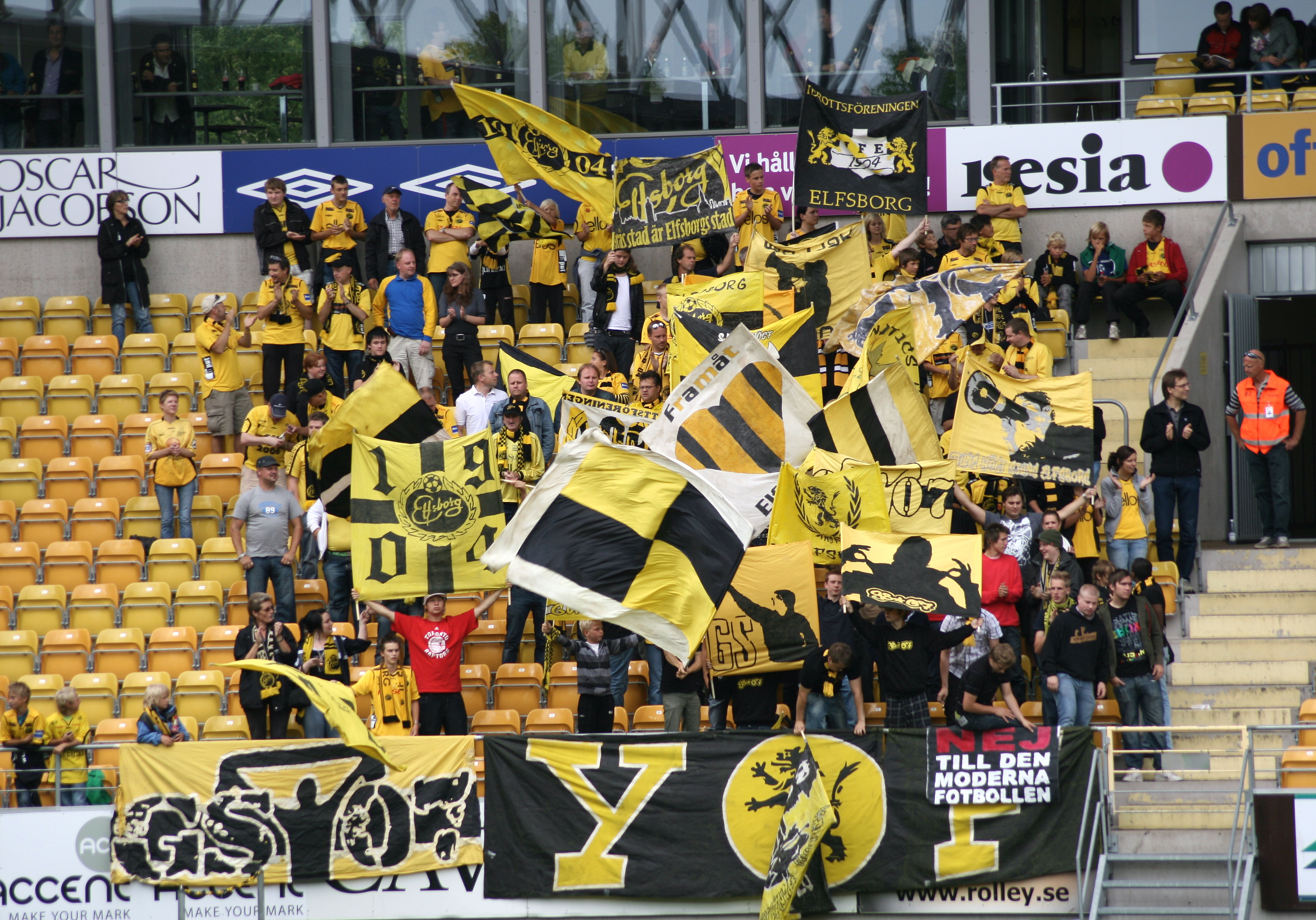 Supporterföreningen "Guliganerna" stöttar Elfsborg under en fotbollsmatch mot Riga